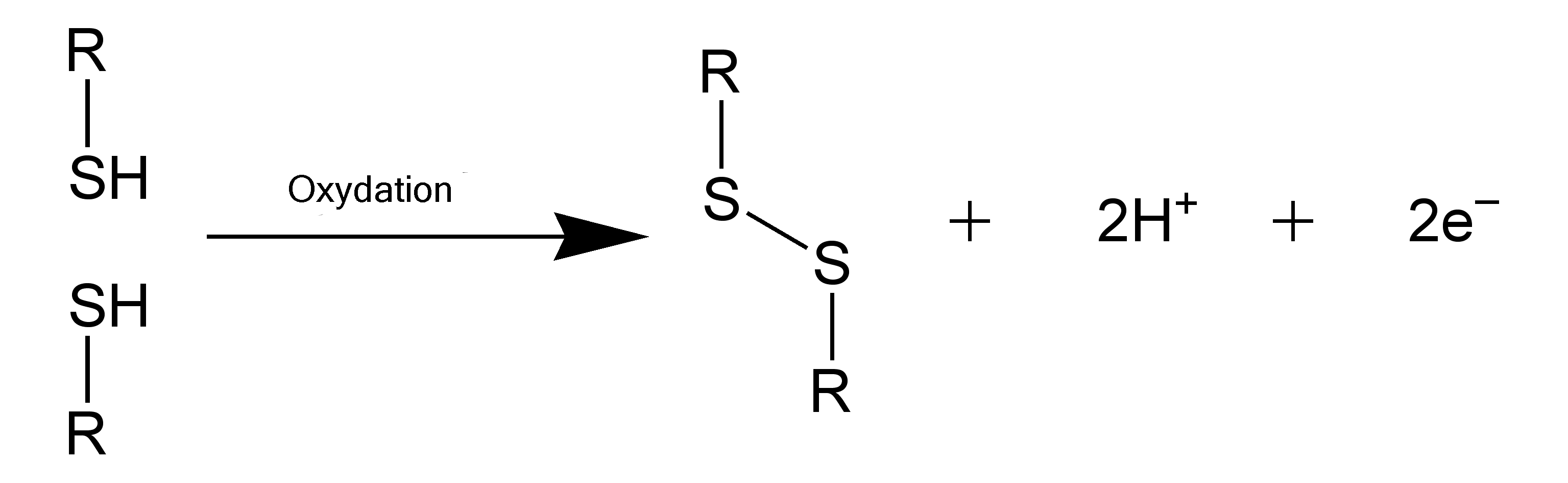 Pont disulfure (remplacement de i par y dans la version française